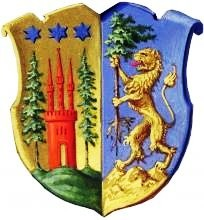 Wappen der (Freiherren) von Waldthausen; erstmals Reichsadel 1556 für den braunschweig-lüneburgischen Kanzler Jobst von Waldthausen samt Vettern; 1887 und 1904 preuß. Adelsbestätigungen für den Essener Zweig.